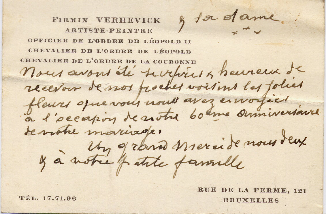 Carte de visite du peintre Verhevick, avec texte autographe, à l'occasion de ses soixante ans de mariage